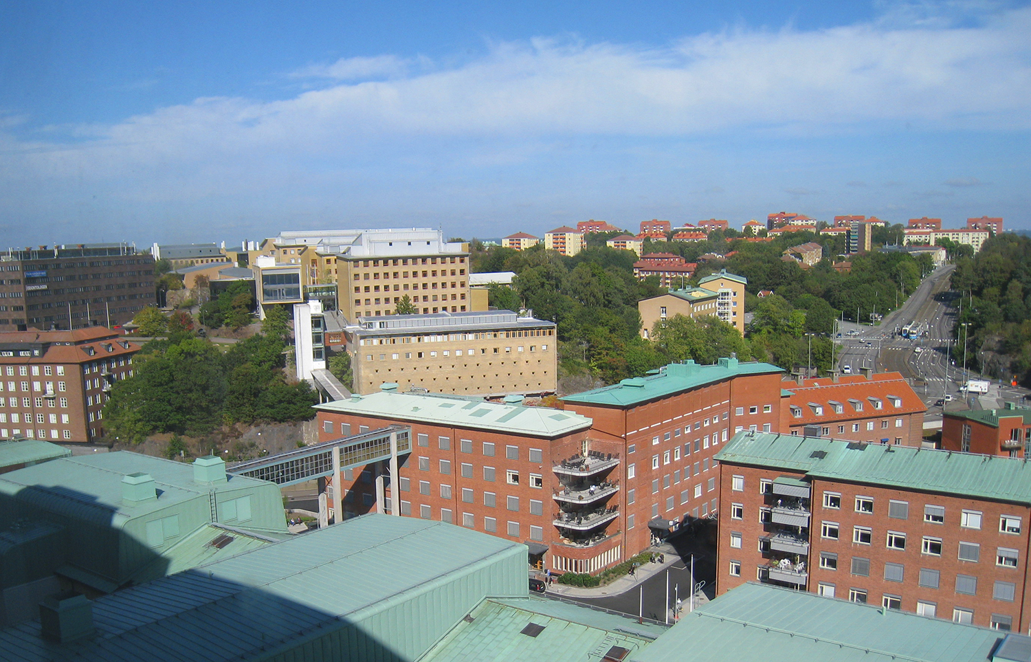 Medicinareberget sett från Sahlgrenska centralkomplexet. Göteborg.